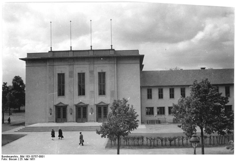 Illus-Biscan Leu-Qu. 25.5.51 Das Magdeburger Kulturhaus fertiggestellt. Das neue Kulturhaus der Magdeburger SAG-Betrieb wurde Anfang Mai fertiggestellt. - In geschmackvoll eingerichteten Klub- und Leseräumen kann sich die Bevölkerung erholen und weiterbilden. 2 Festsäle (1000 und 250 Besucher fassend) stehen für Veranstaltungen zur Verfügung. UBz, Das Kulturhaus der fünf SAG-Betriebe in Magdeburg.